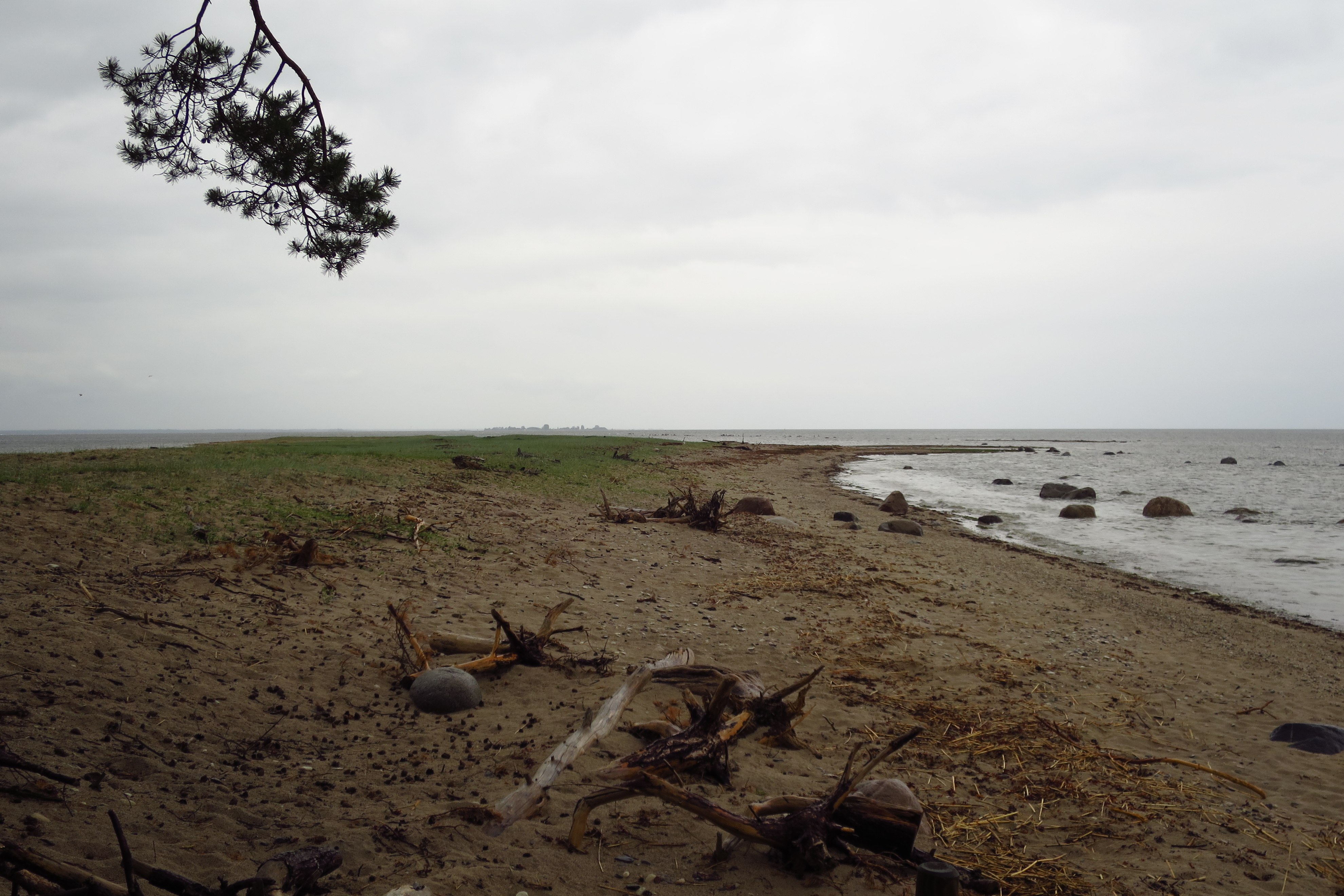 Pilliots Kihnus